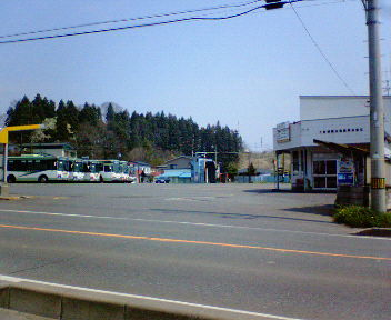 十和田観光電鉄七戸案内所（向かいの歩道側から撮影）